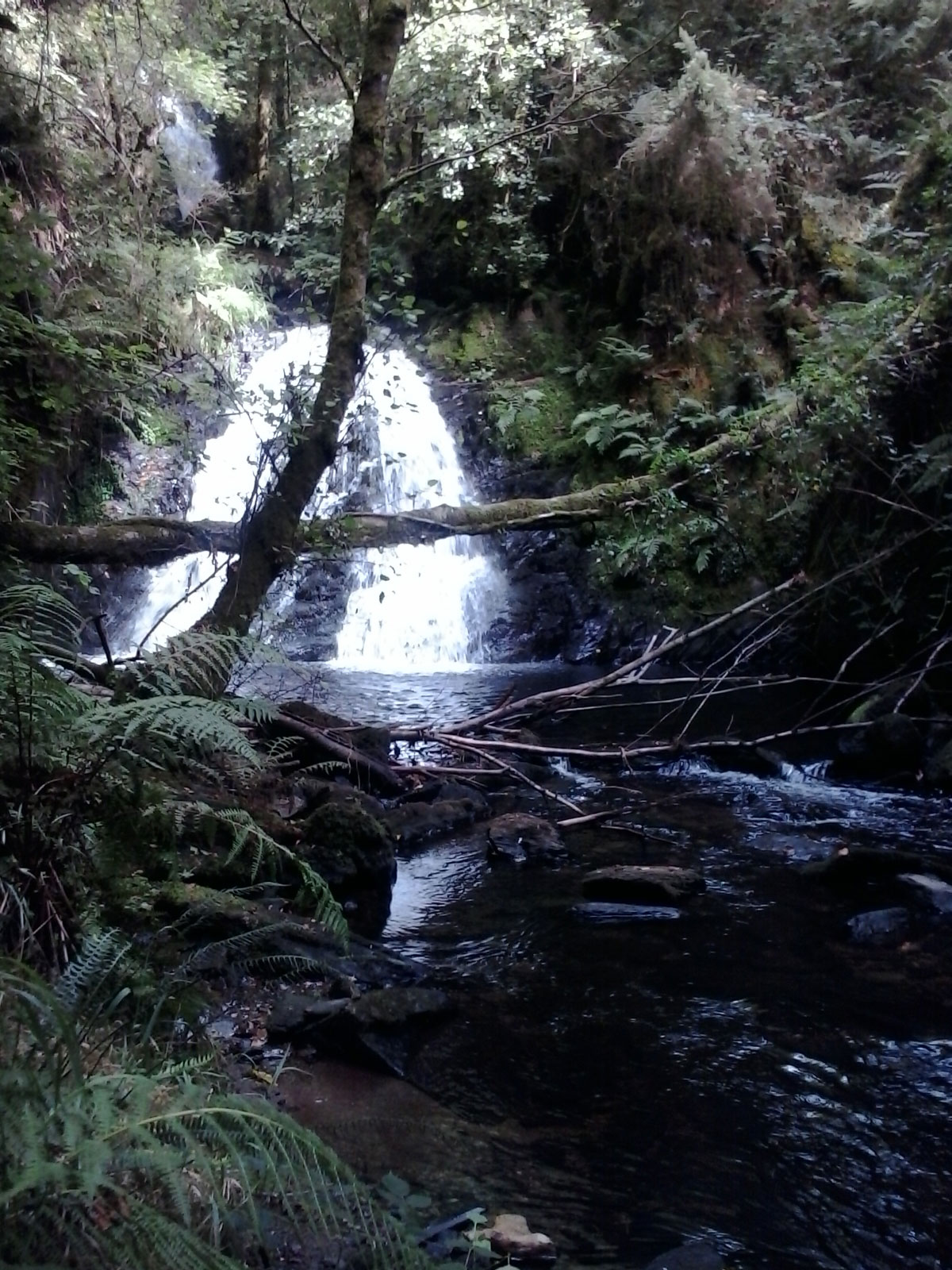 Imaxe da Poza da Onda no río Mendo A Rexidoira Cesuras, Concello de Oza-Cesuras A Coruña Galiza Spain